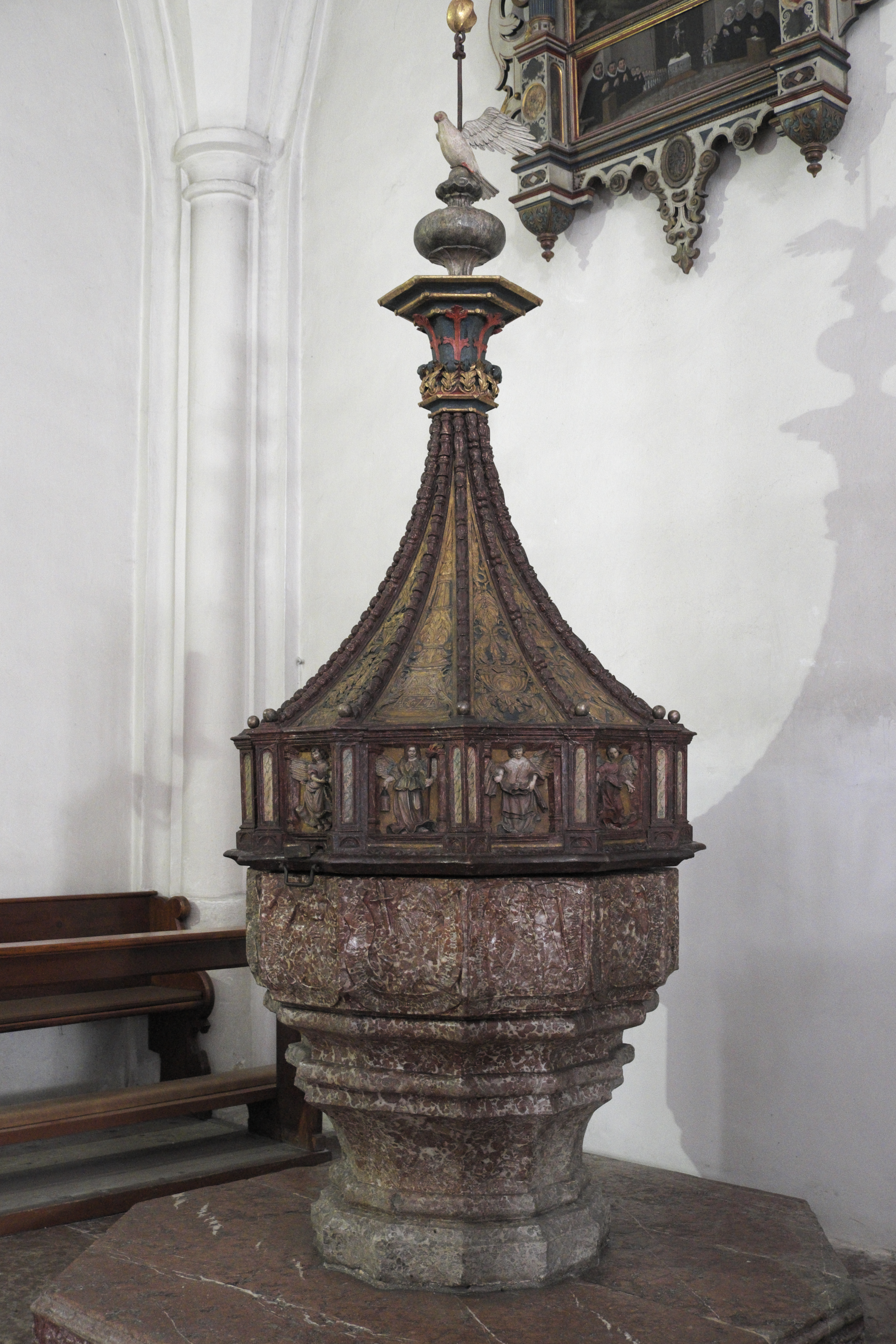 Katholische Pfarrkirche, ehemalige Stiftskirche des Augustiner-Chorherrenstiftes St. Zeno in Bad Reichenhall im Landkreis Berchtesgadener Land (Bayern/Deutschland), Taufstein von 1522, am Holzdeckel Reliefs von Engeln mit Leidenswerkzeugen